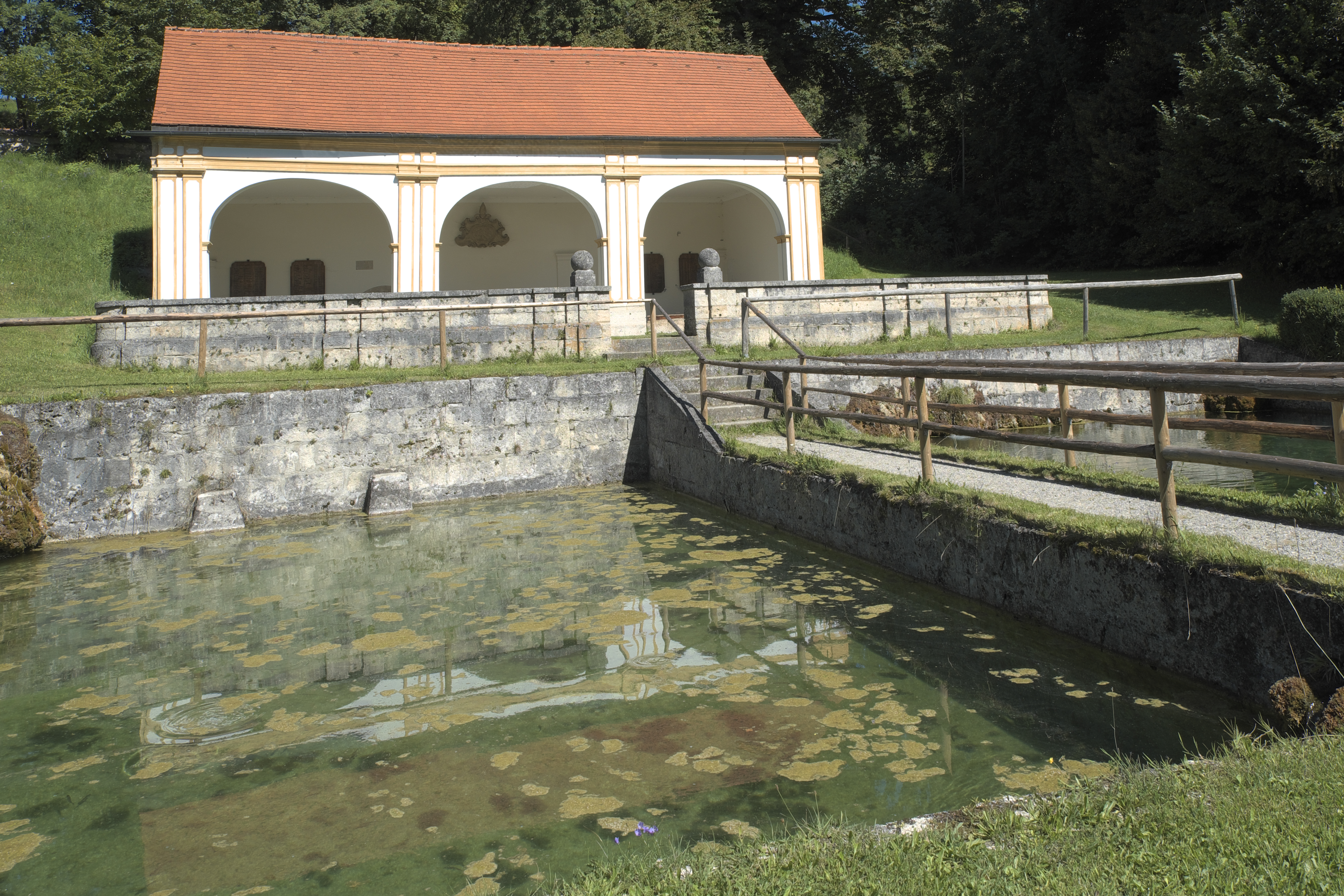 Brunnenhaus des ehemaligen Klosters Wessobrunn in Wessobrunn im Landkreis Weilheim-Schongau (Bayern/Deutschland), von 1735